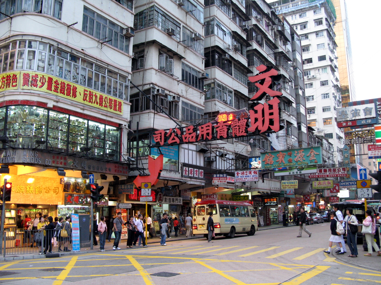 Sai Yee Street in Monk Kok, Hong Kong